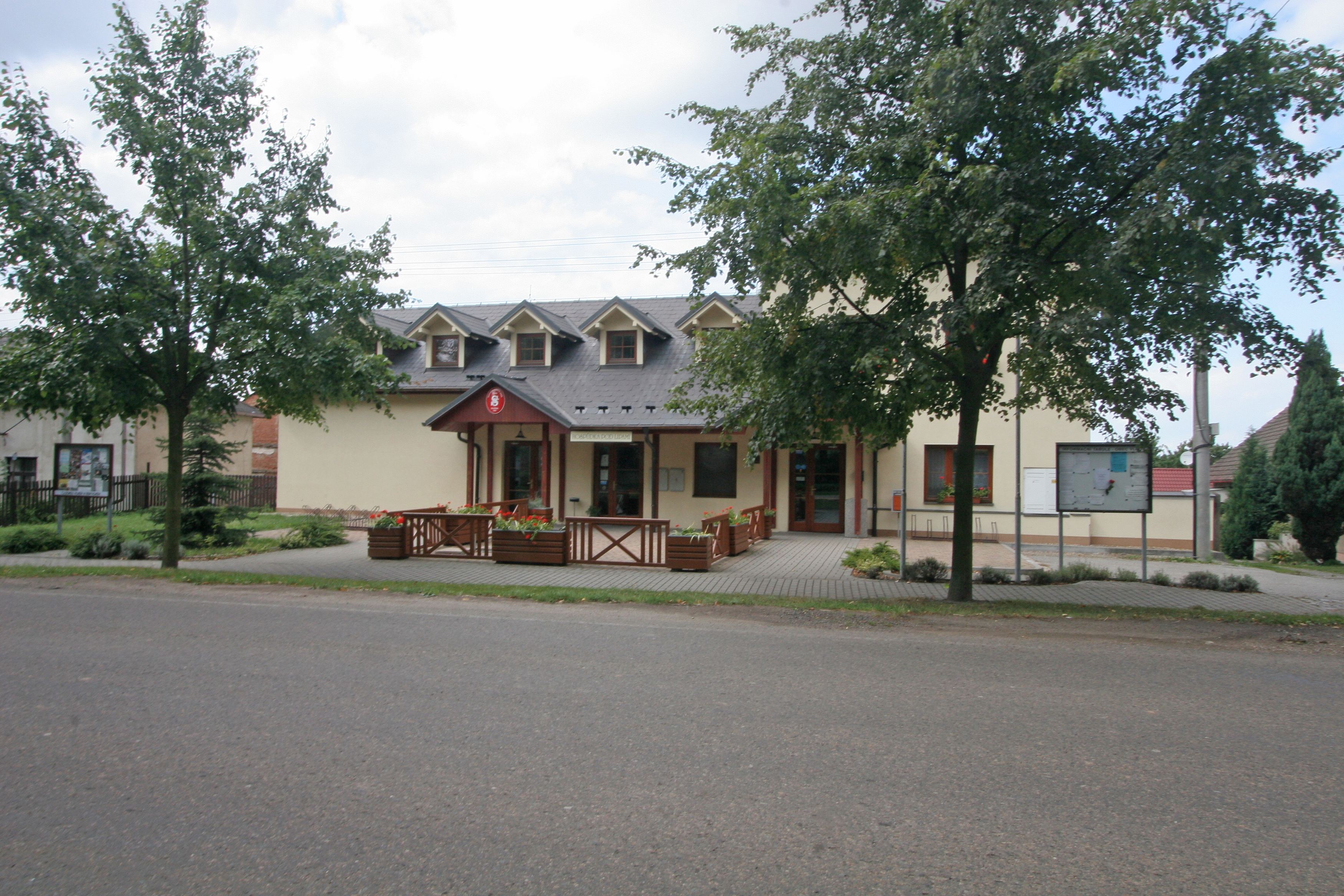 Vlkov obecní úřad